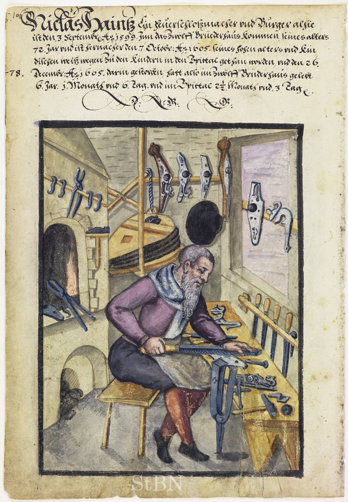 Niclas (Nikolaus; Nicolaus) Haintz (Heinz), Feuerschloßmacher (Feuerschlossmacher; Büchsenmacher) Transkription und weitere Informationen